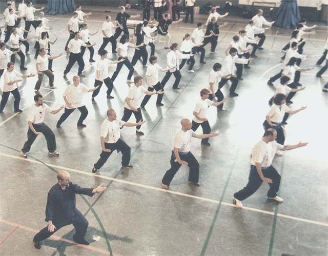 Taijiquan form (Taijiquan Taolu) - Associació Catalana de Choy Li Fut, Tai Chi Chuan i Chi Kung